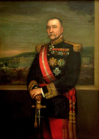 Retrato del militar y político español Diego Muñoz Cobos (1854-1937), que alcanzó en rango de teniente general y llegó a ser ministro de Marina en el reinado de Alfonso XIII de España.